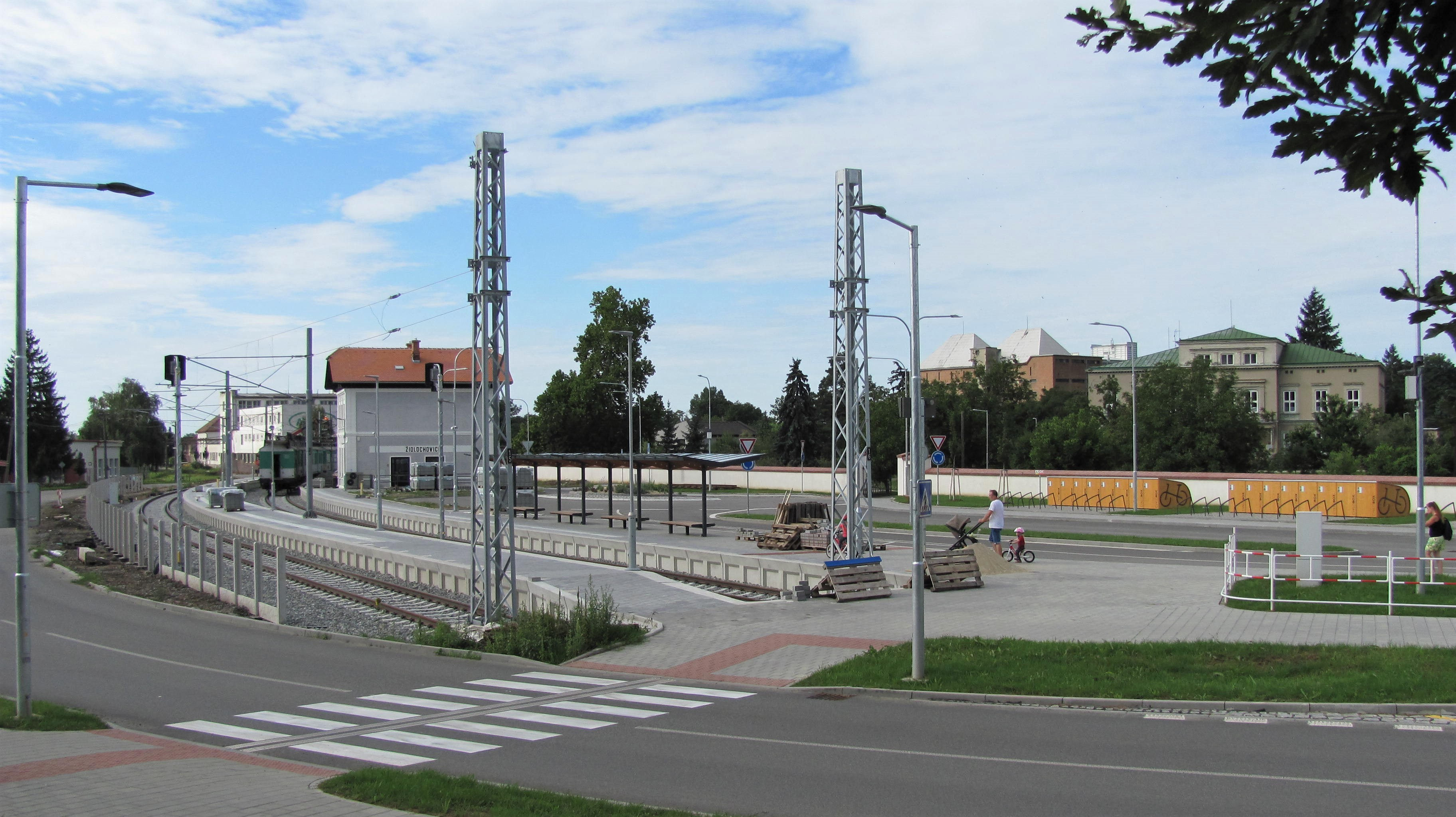 nádraží v Židlochovích dne 18.8.2019